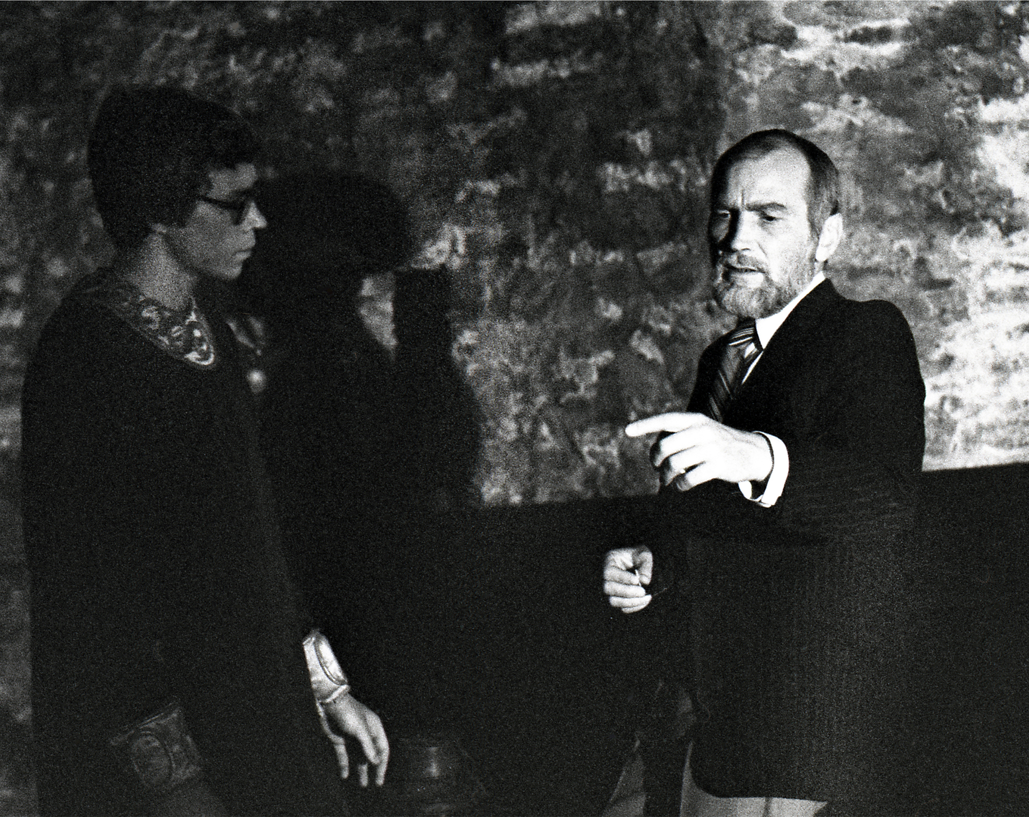 Peeter Sauter ja Mikk Mikiver. XI lend 1980-1984 kursuse juhendaja Mikk Mikiver. “Heinrich IV", esiet. Kiek in de Kökis, 1983